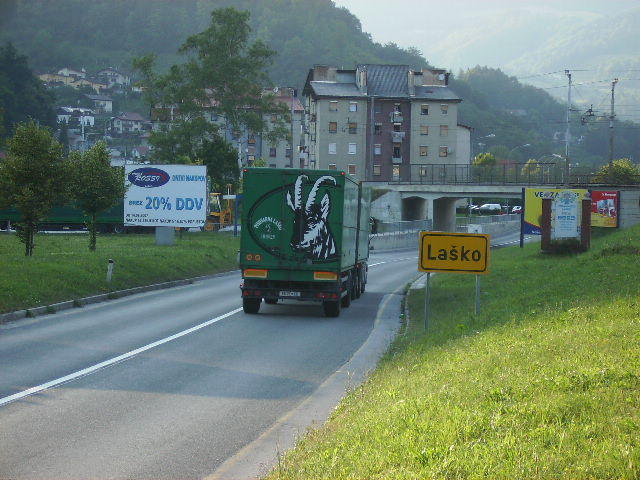 entrée de la ville de lasko, slovénie